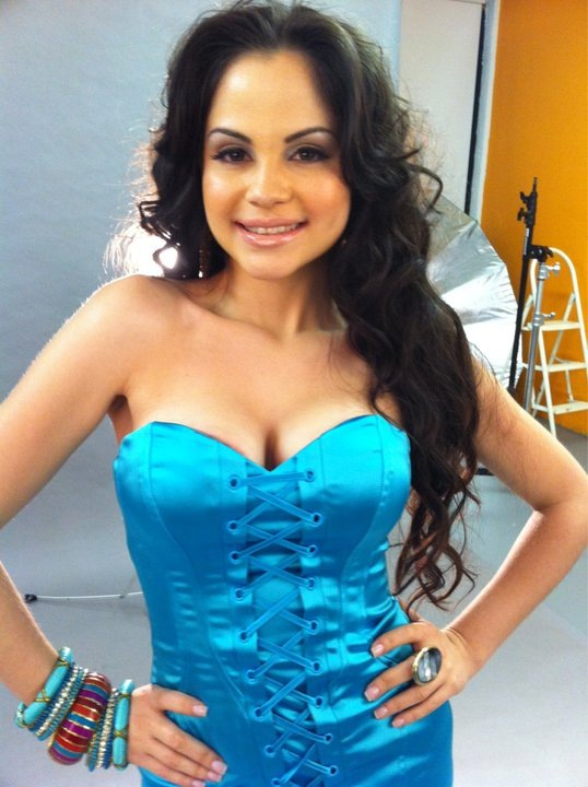 Натти